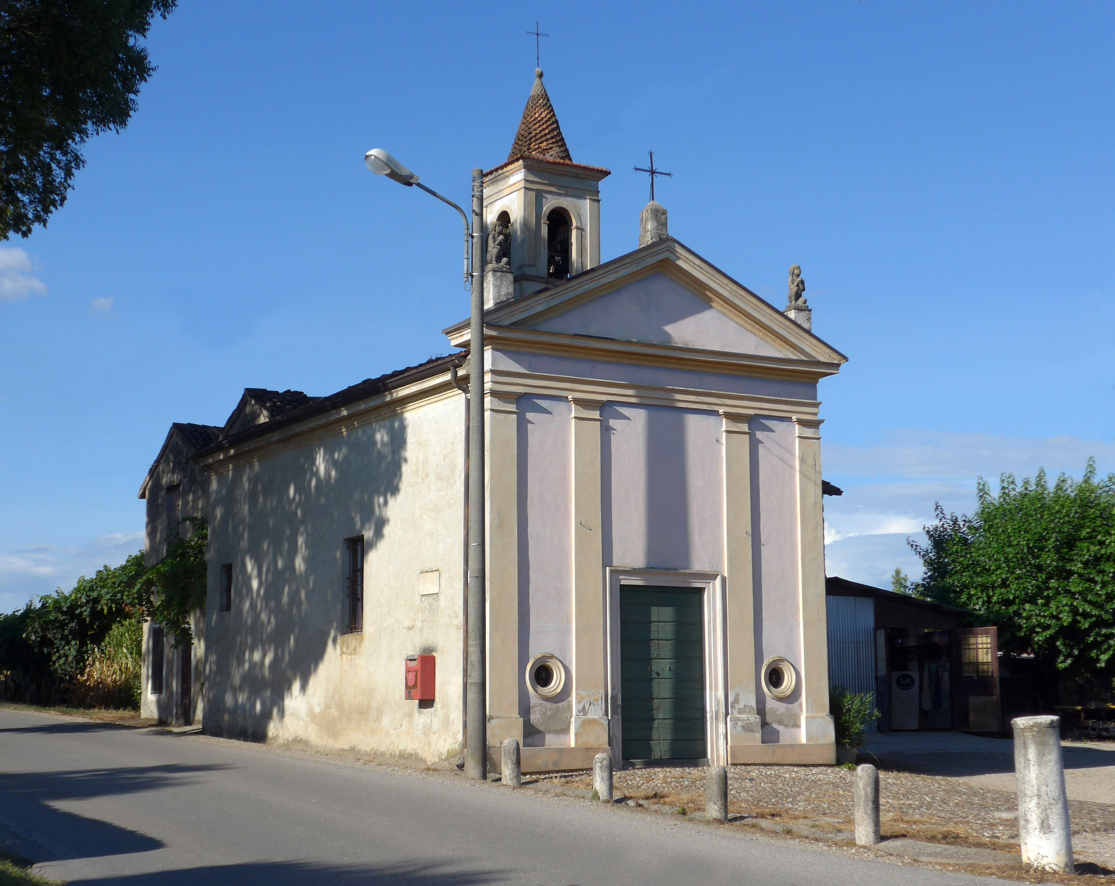 Bande di Cavriana, chiesa.